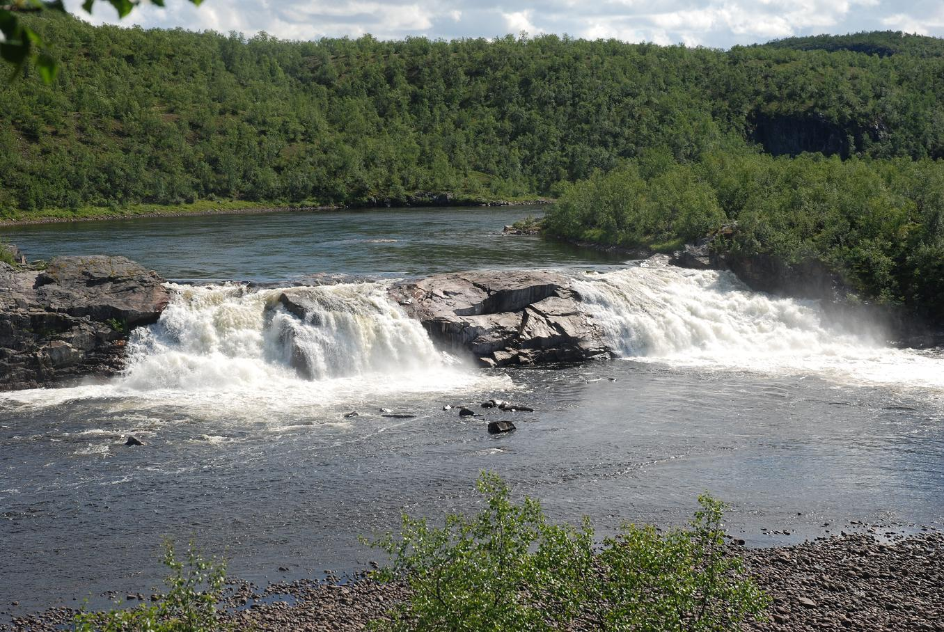 Pikefossen waterfall in Kautokeino river